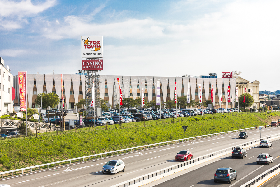 La struttura vista dall'esterno, foto scattata nel 2018.